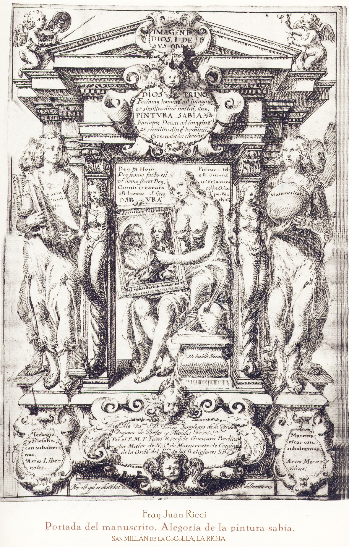 Fray Juan Ricci. Monaterio de San Millán